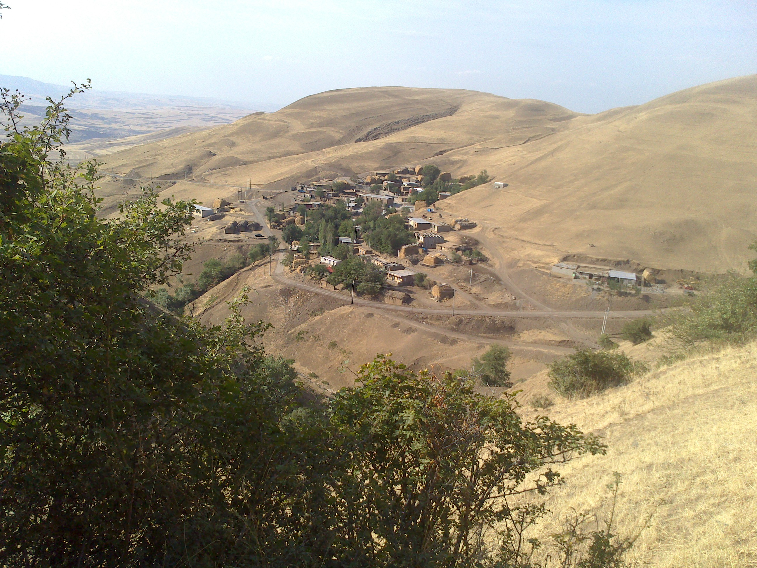 روستای قره یتاق تابستان94